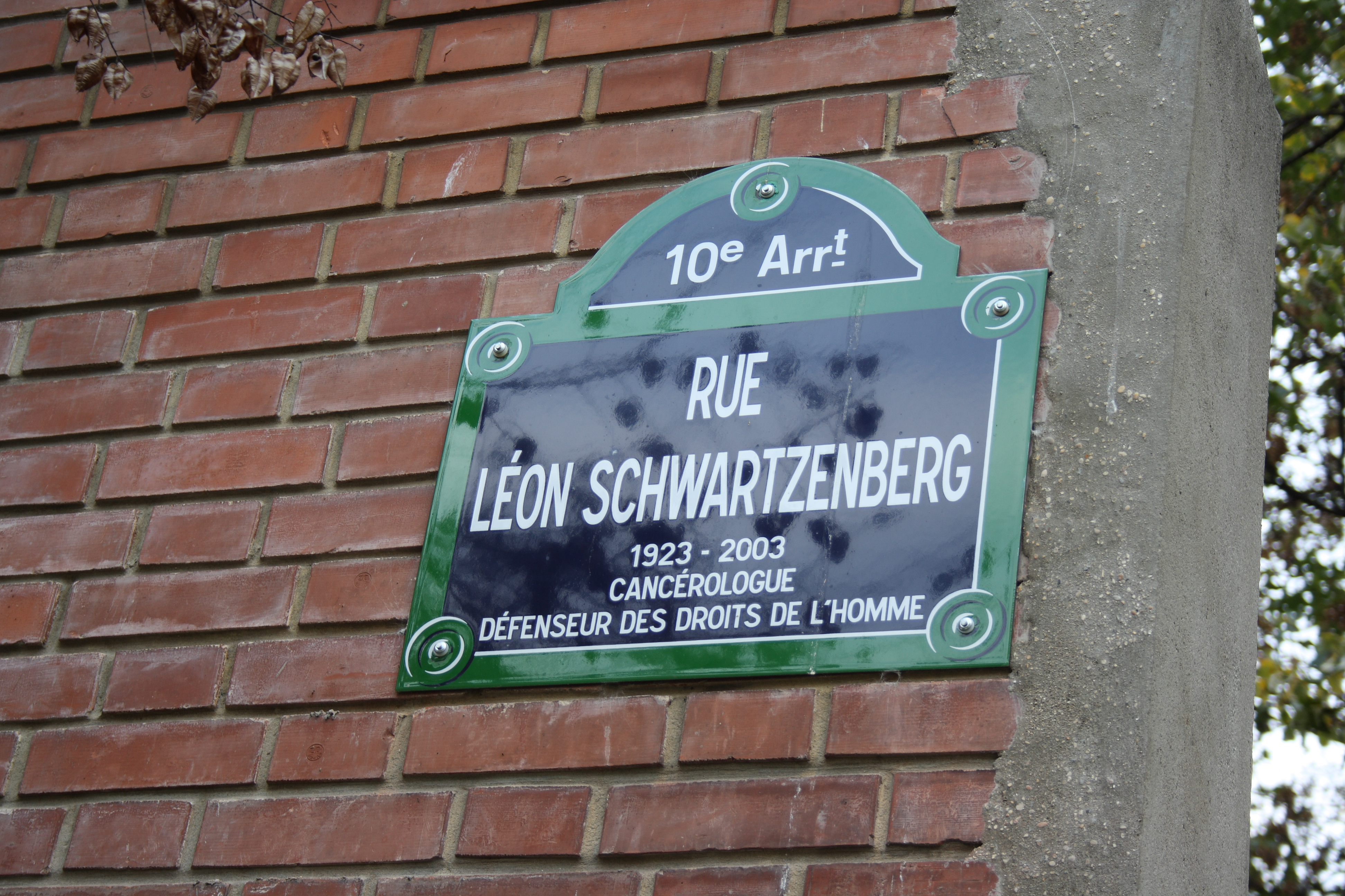 Straßenschild Rue Léon-Schwartzenberg in Paris